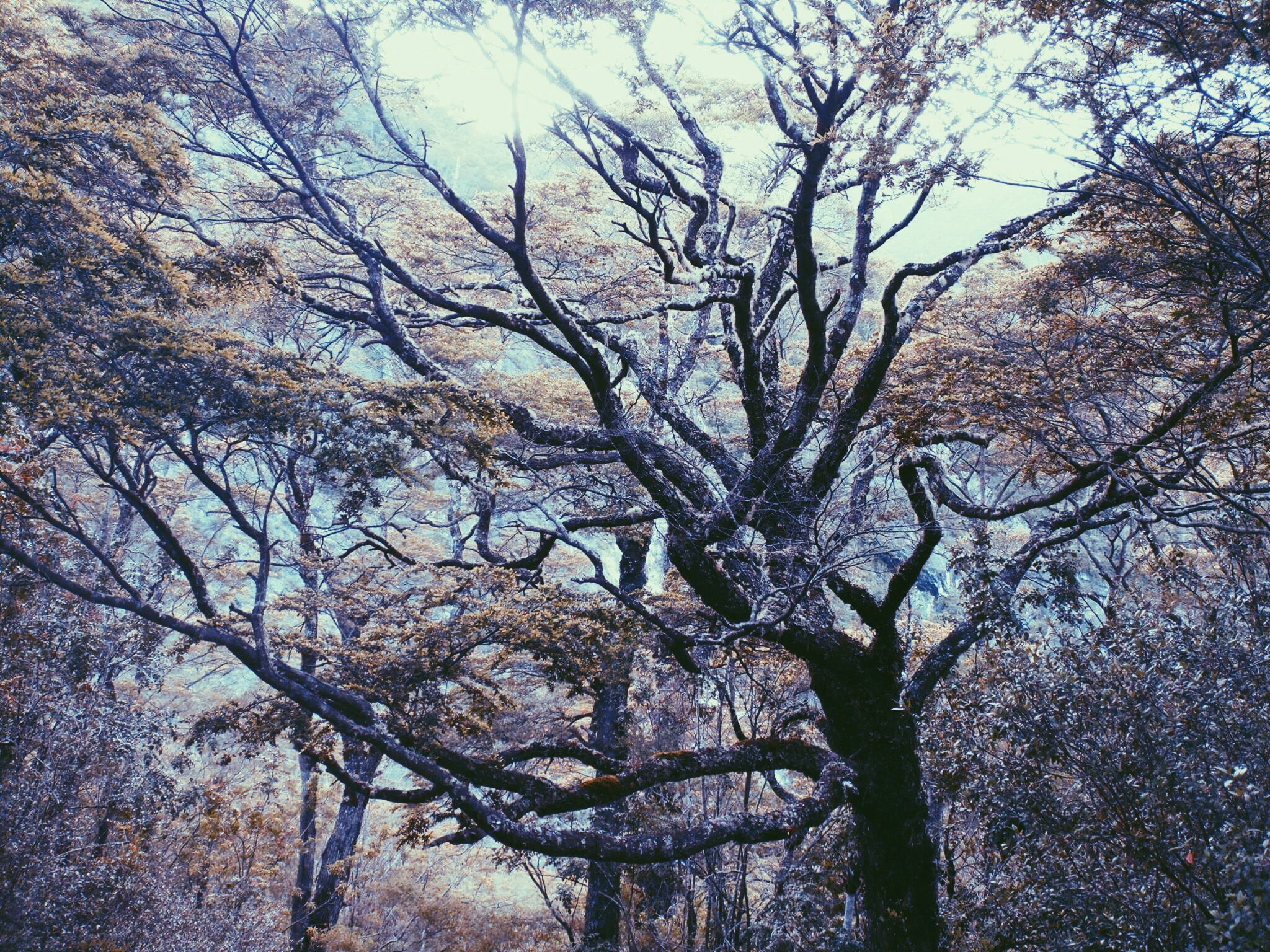 Sin duda esta imagen dice más que mil palabras. El parque Nacional Vicente Pérez Rosales, dejará encantado a cualquier persona que lo visite; tanto por sus paisajes, como por su tranquilidad y el cuidado que ha tenido el propio país en mantener cada de detalle que distingue este lugar de otros parques.